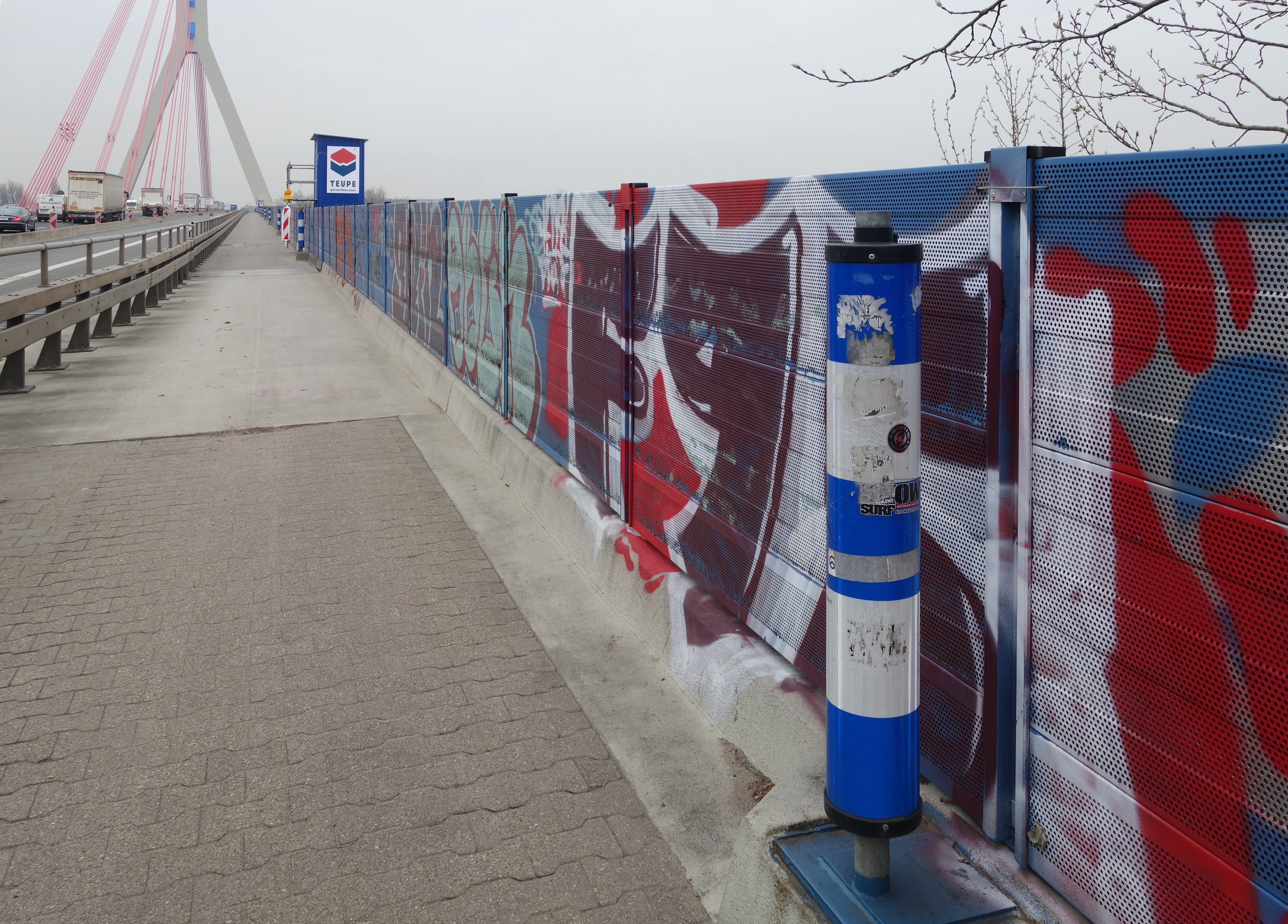 Düsseldorf, Fleher Brückemit Lärmschutzwand.